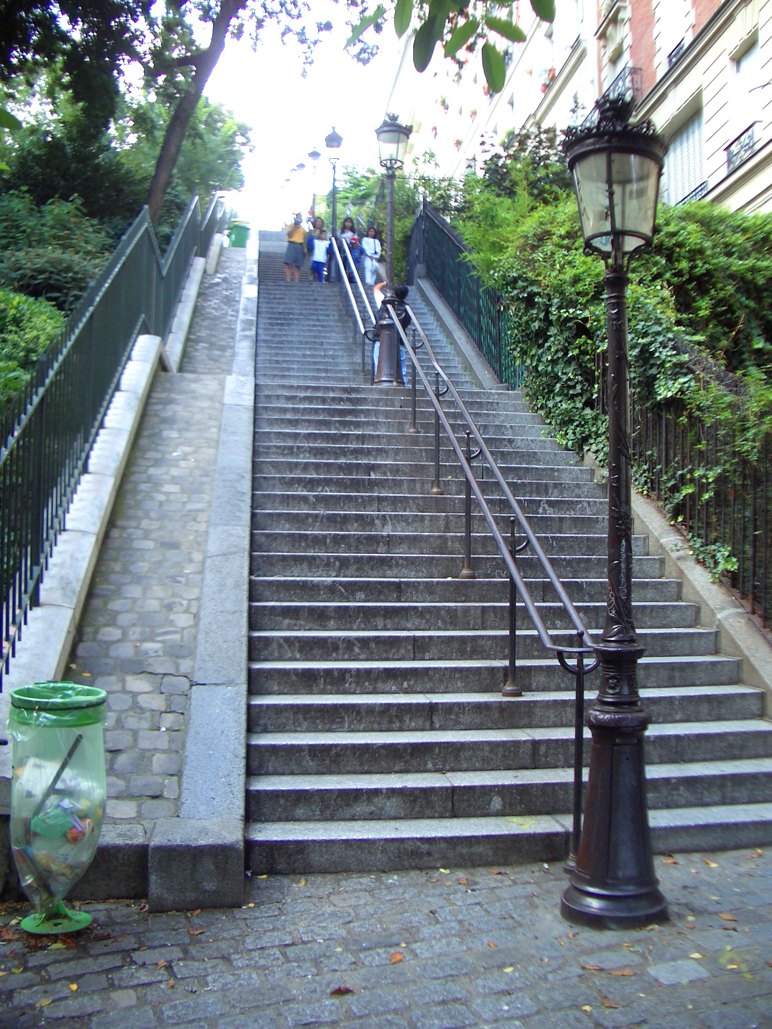 Stairs (rue Maurice Utrillo) at Montmartre, Paris